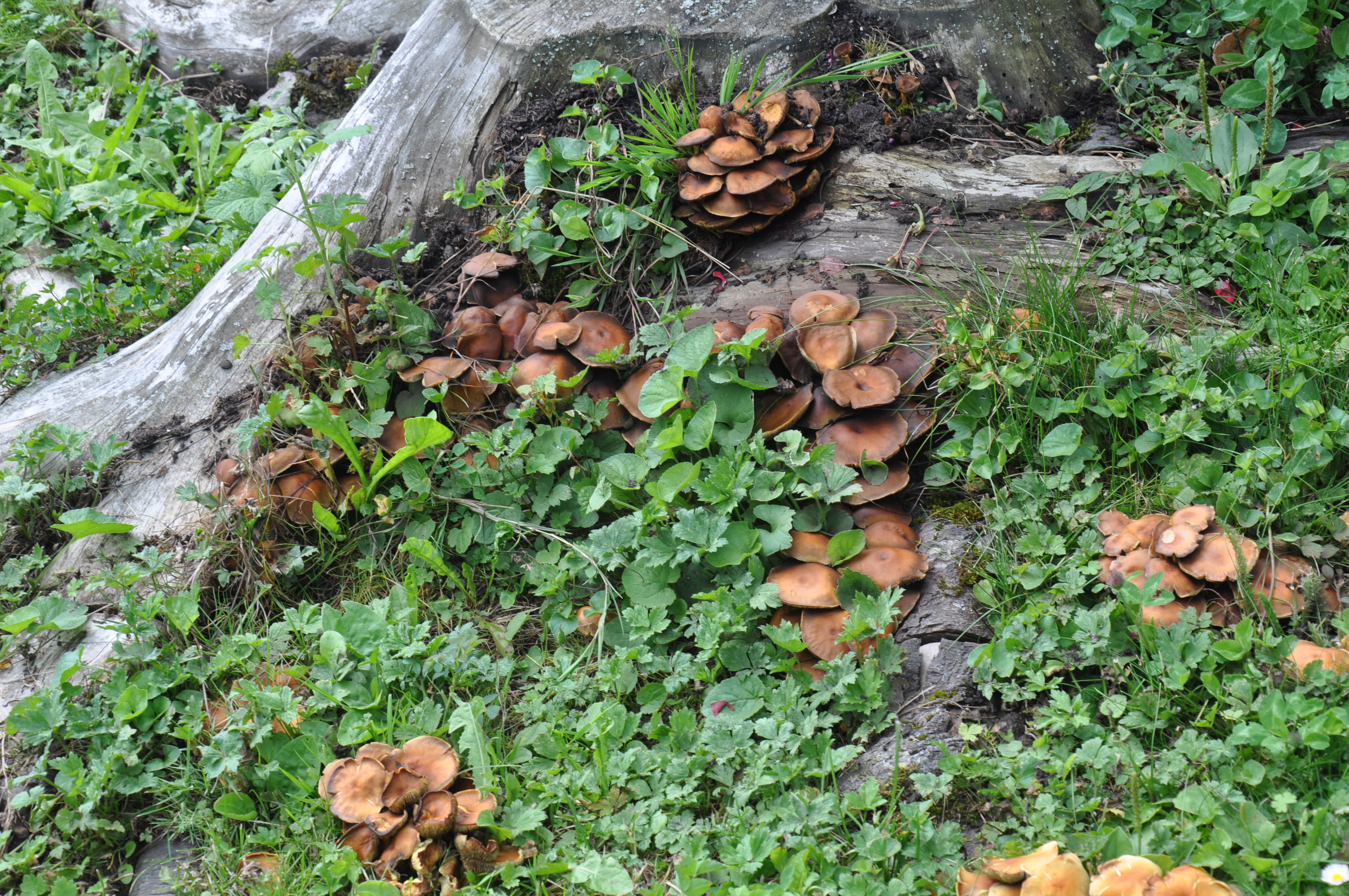 A Hypholoma fasciculare cluster.